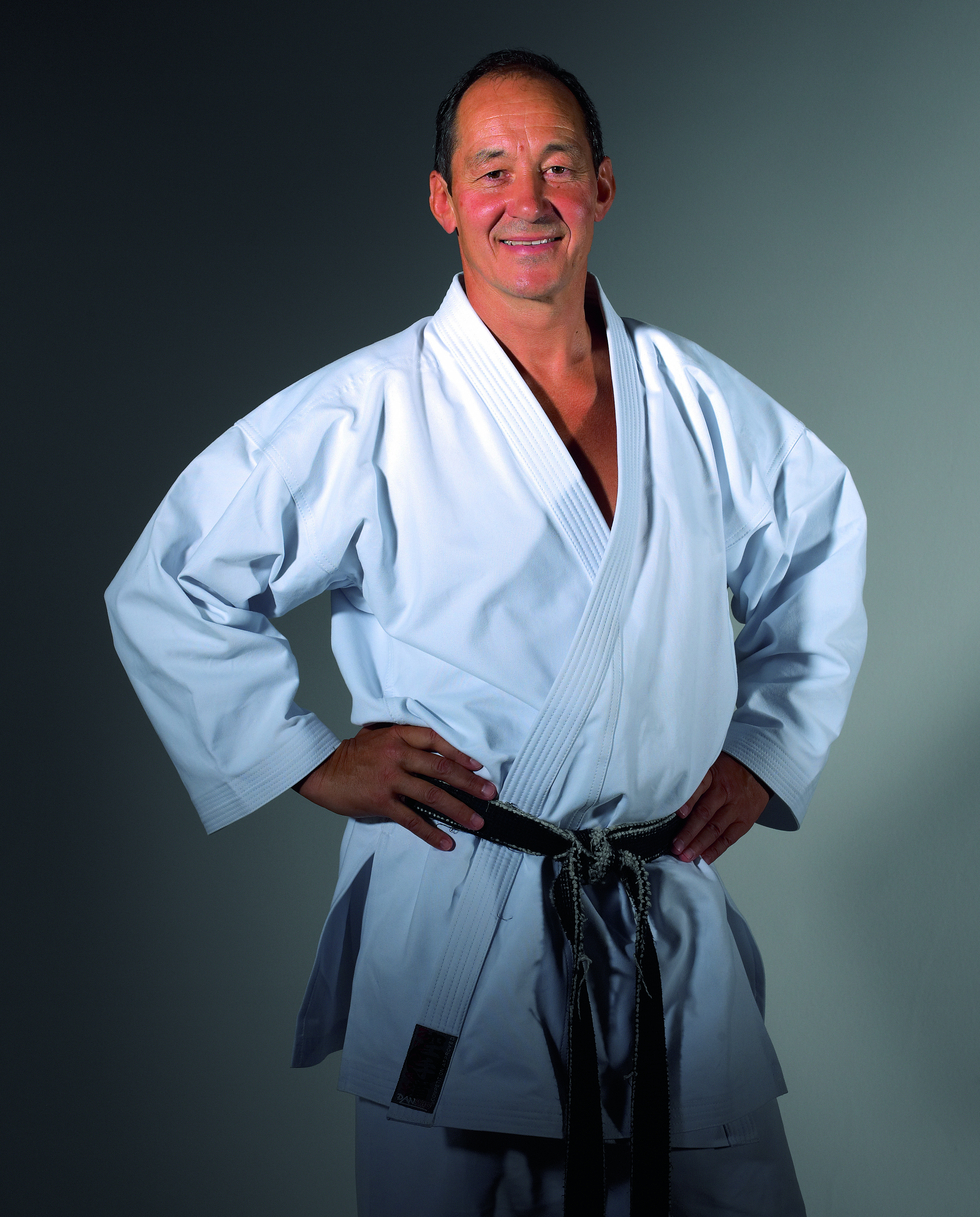 9. Dan Shotokan, Nationaltrainer Deutschland 1980-2001 Mit ihm als Trainer feierte das deutsche Karate Nationalteam größte Erfolge bei Europa-, Weltmeisterschaften und vielen Weltcups. Unvergesslich ist die Karate-WM 2000 in der Olympiahalle in München, die erfolgreichste in der Geschichte des deutschen Karate. Von 2010 – 2018 erfolgreich als Landestrainer der Leistungsklasse in Baden-Württemberg.